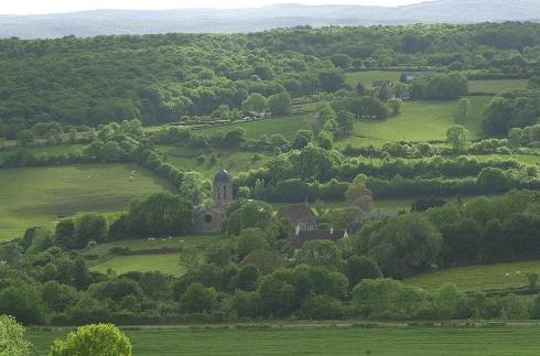 Bar-le-Régulier